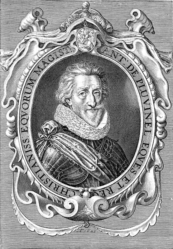 Antoine de Pluvinel (l'instruction du roi en l'exercice de monter à cheval - ed 1625)